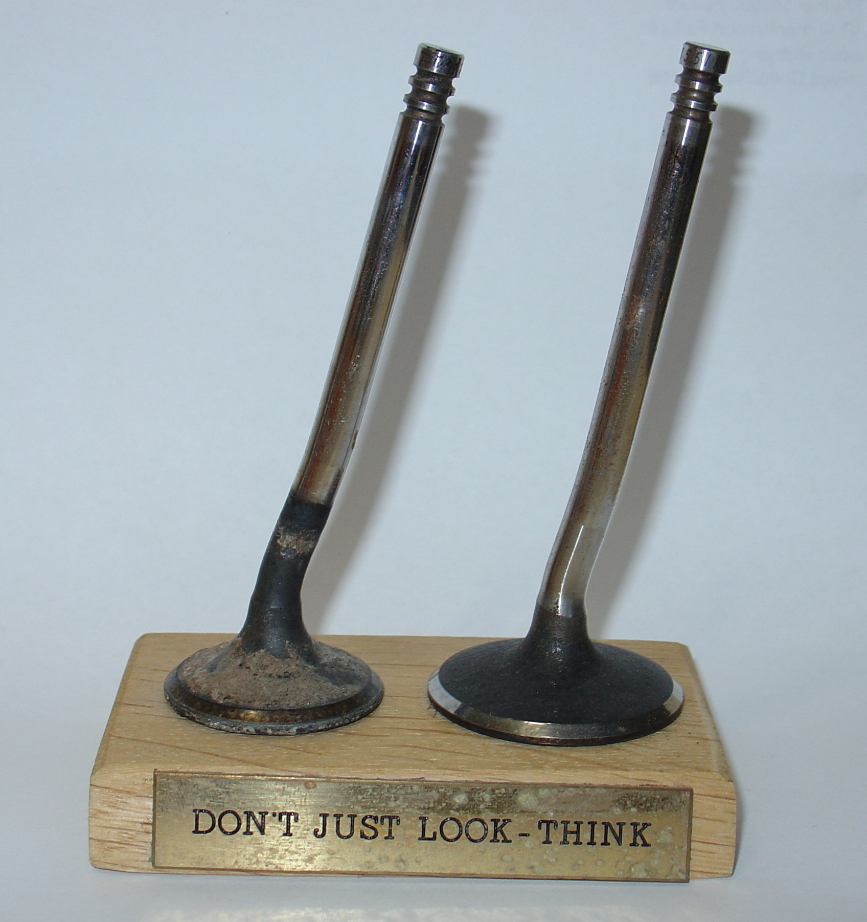 Soupapes de moteur thermique abimées par la casse de la courroie de distribution